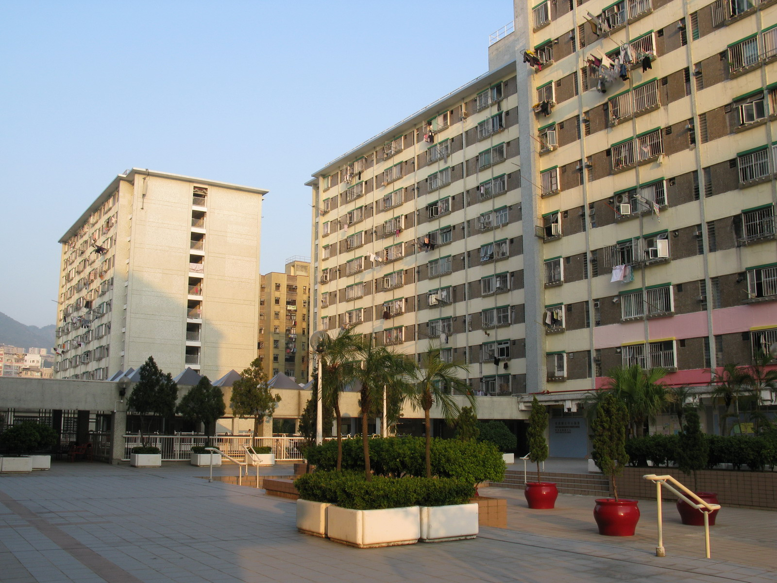 麗閣邨 Lai Kok Estate